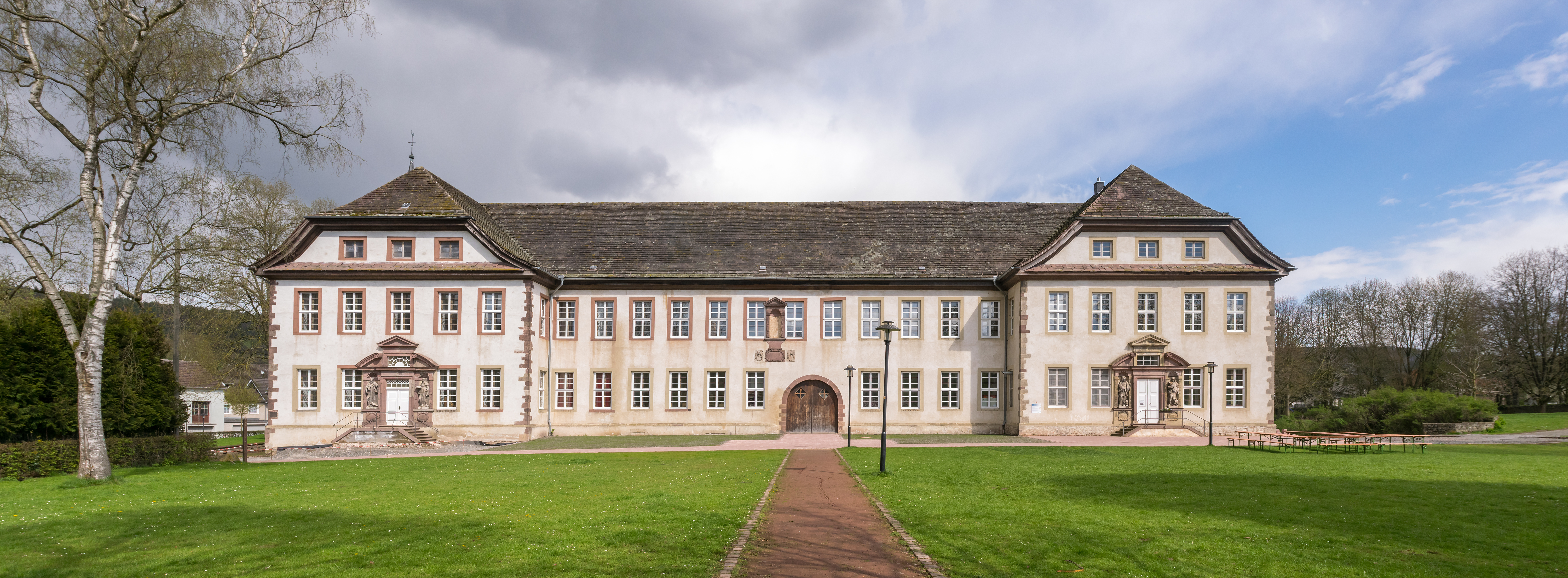 Das (heute) koptisch-orthodoxe Kloster Brenkhausen bei Höxter.